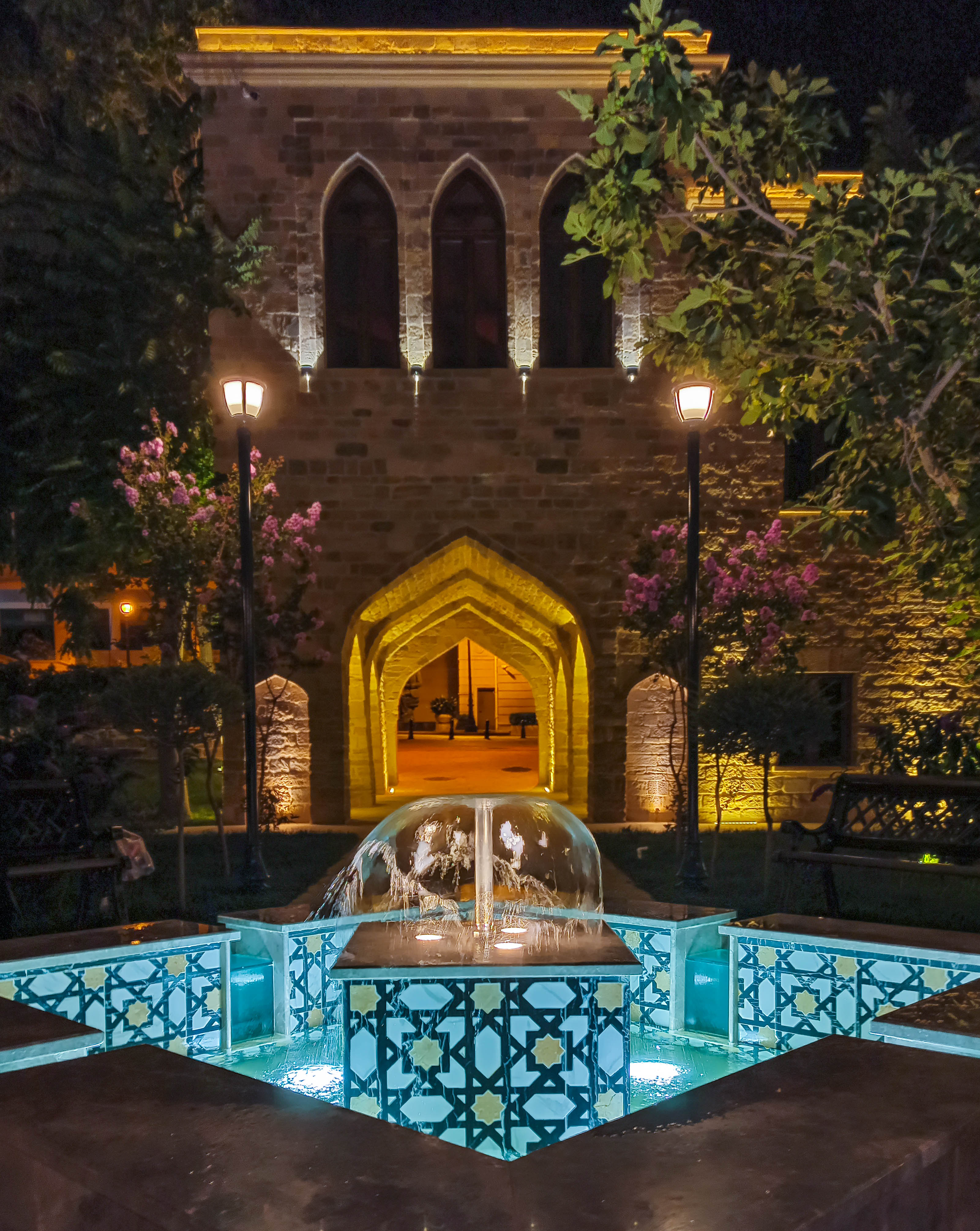 Bakı xan sarayının əsas girişinin Xan bağı tərəfdən görünüşü